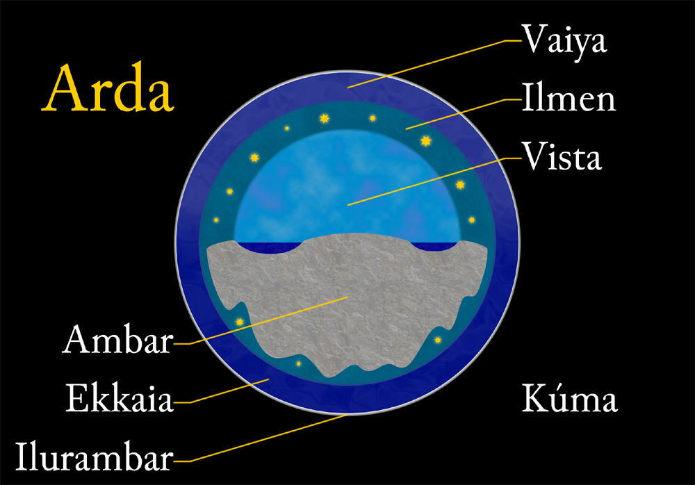 Esquema de una de las concepciones descartadas del mundo imaginario de Arda, en el Ambarkanta de J. R. R. Tolkien.